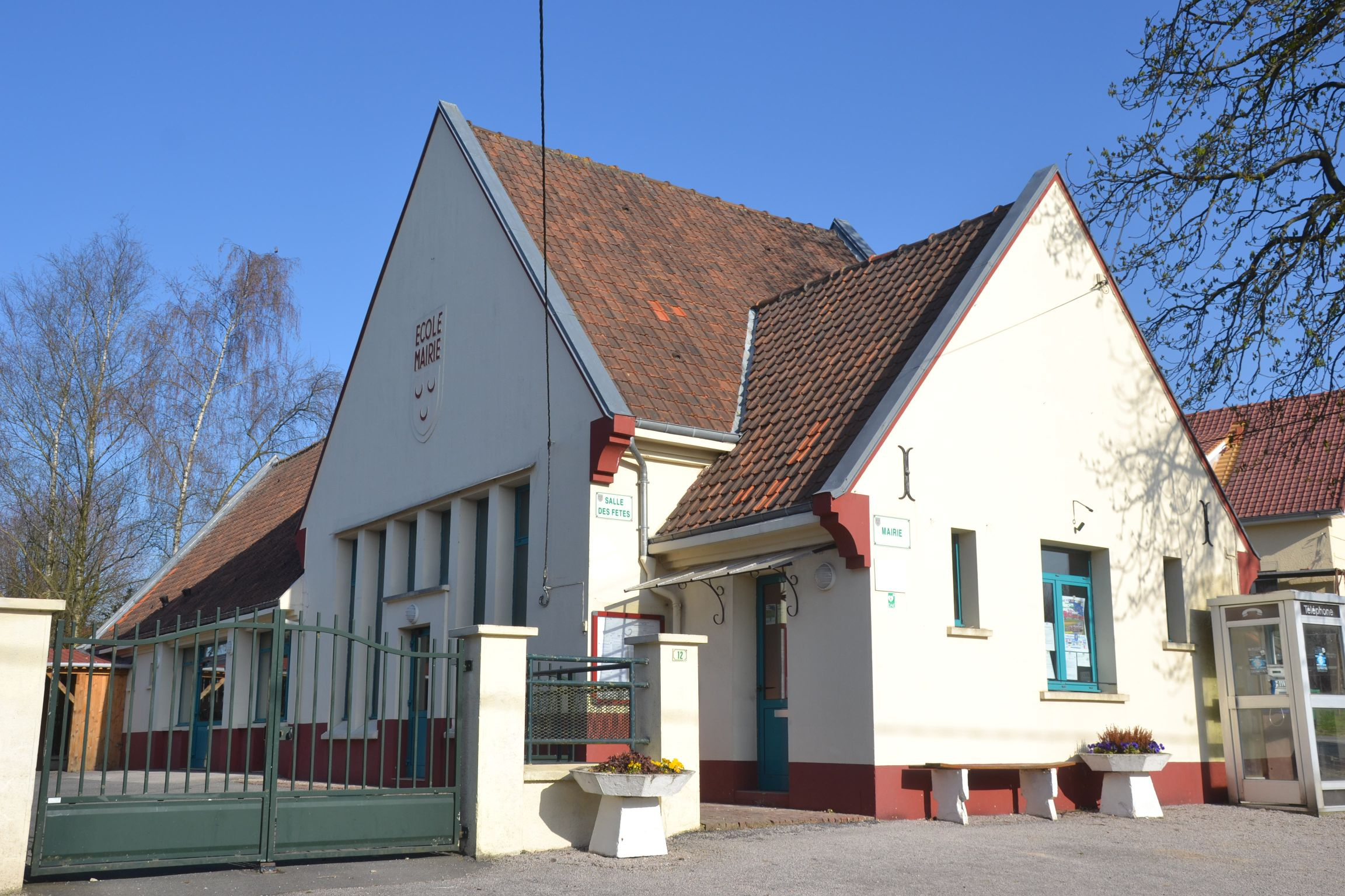 Mairie-école d'Ambricourt